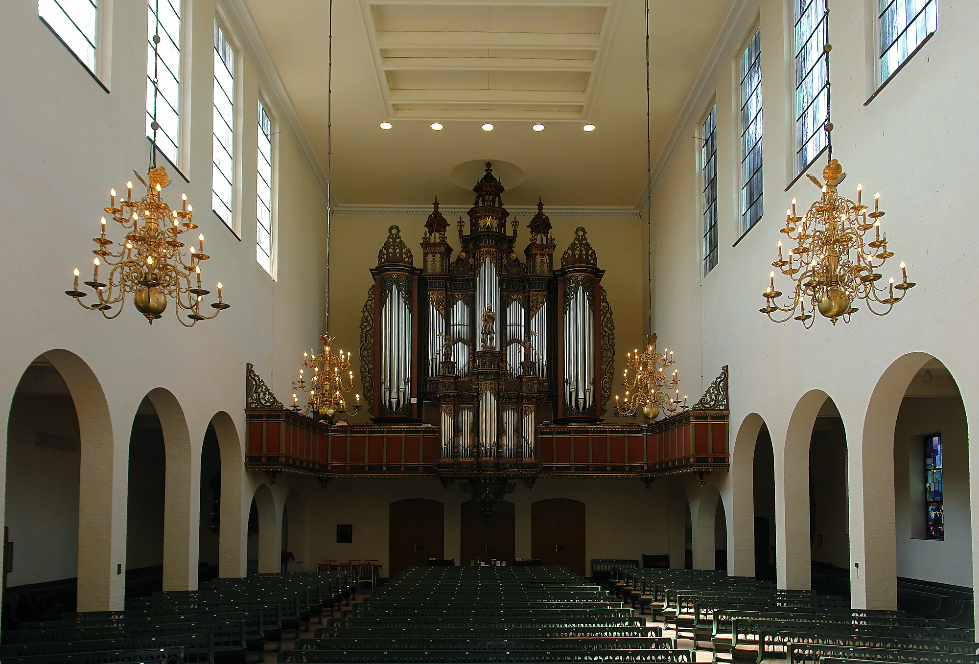 St.Ansgarii-Kirche in Bremen. Blick vom Chor auf die Orgel